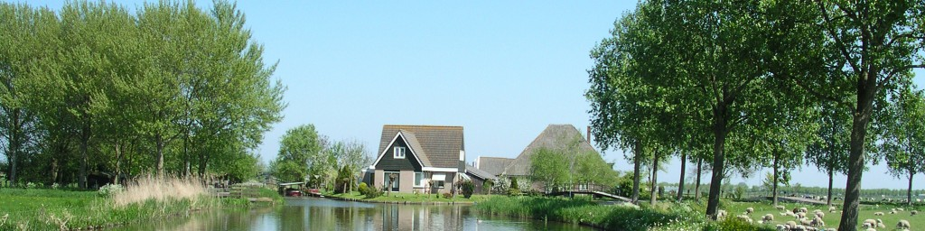 Stolpboerderij aan de rand van het water in Veldhuizen Farm in the open fields of Veldhuis on the water edge.